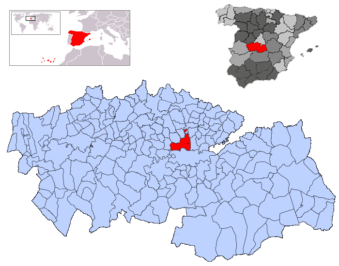 Bargas en la provincia de Toledo